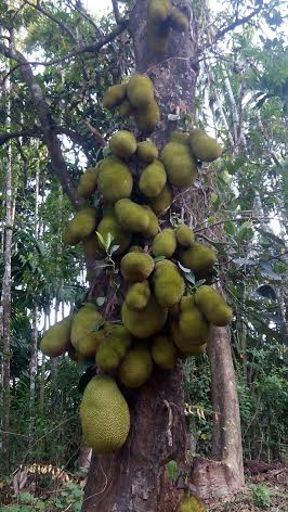 फणसाचे झाड